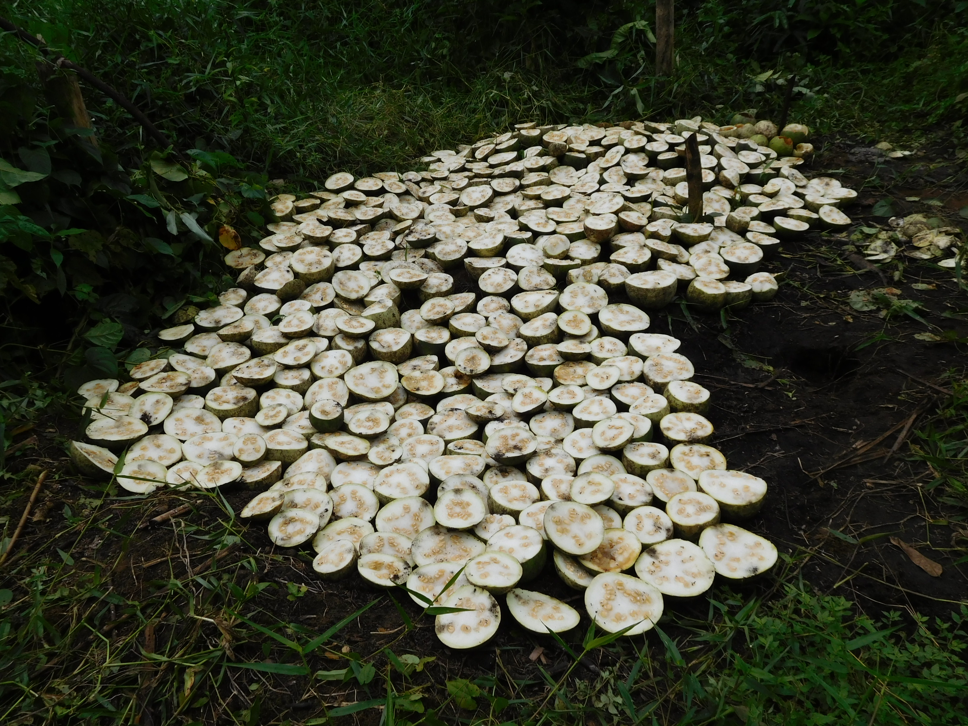 Récolte de Cucumeropsis mannii (Tayap, Cameroun).